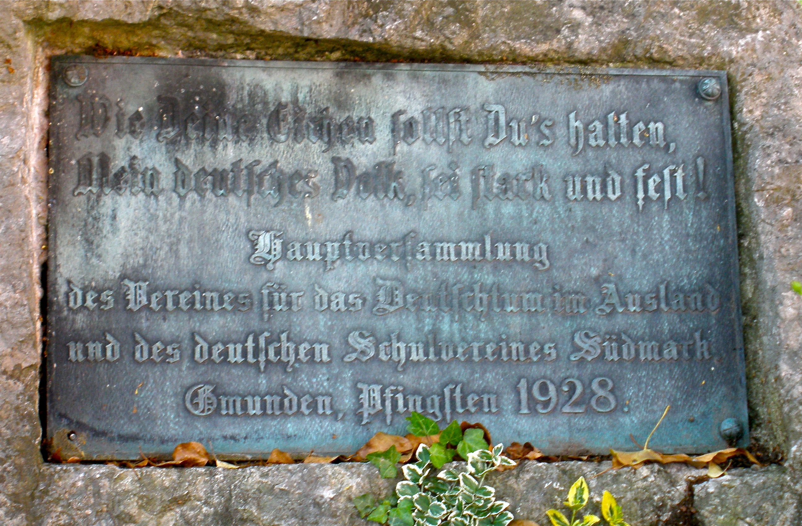 Gedenktafel des Schulvereins Südmark im Viktoria-Luise-Park in Gmunden.